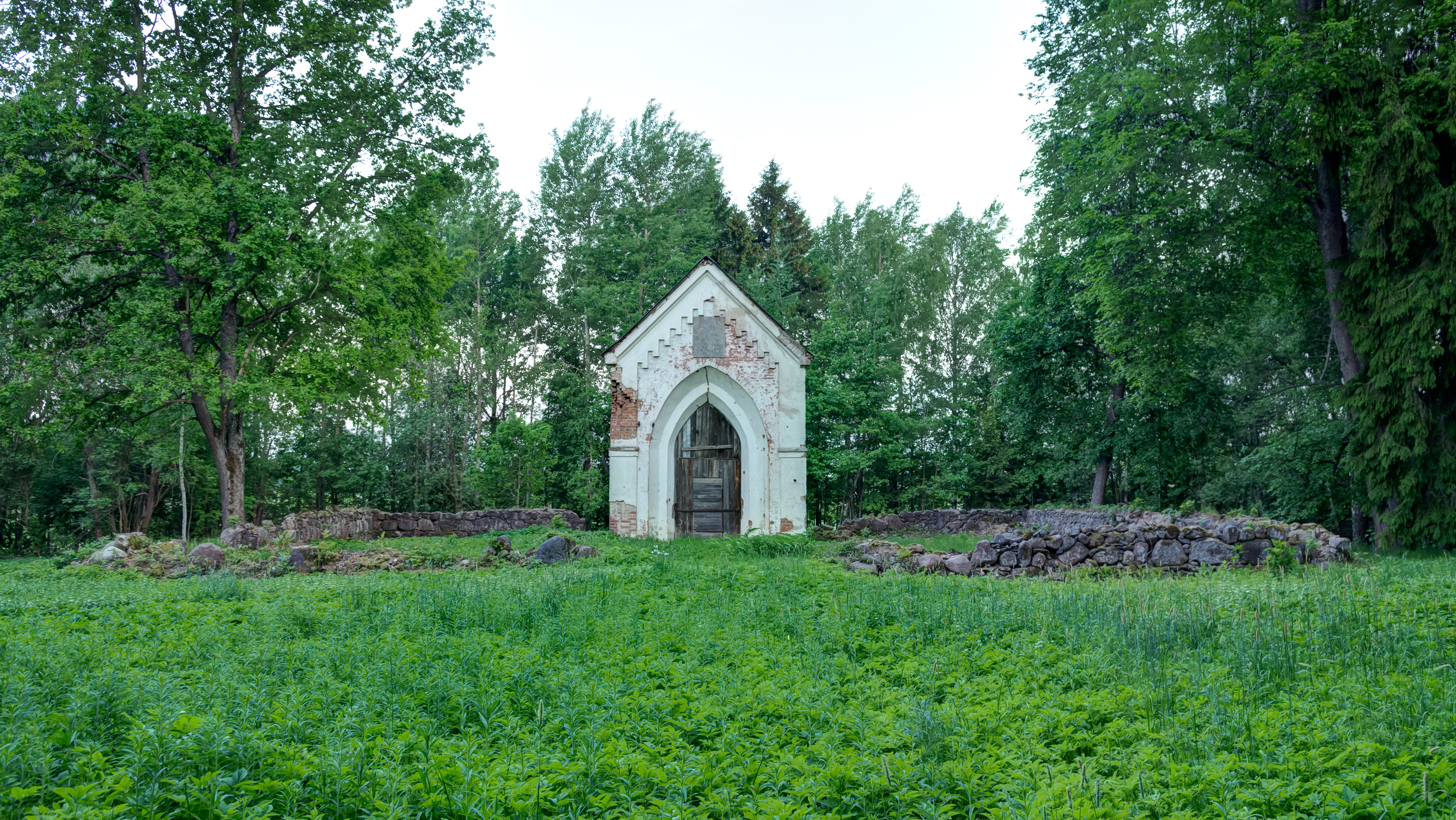 Mäksa mõisa v. Essenite hauakabel